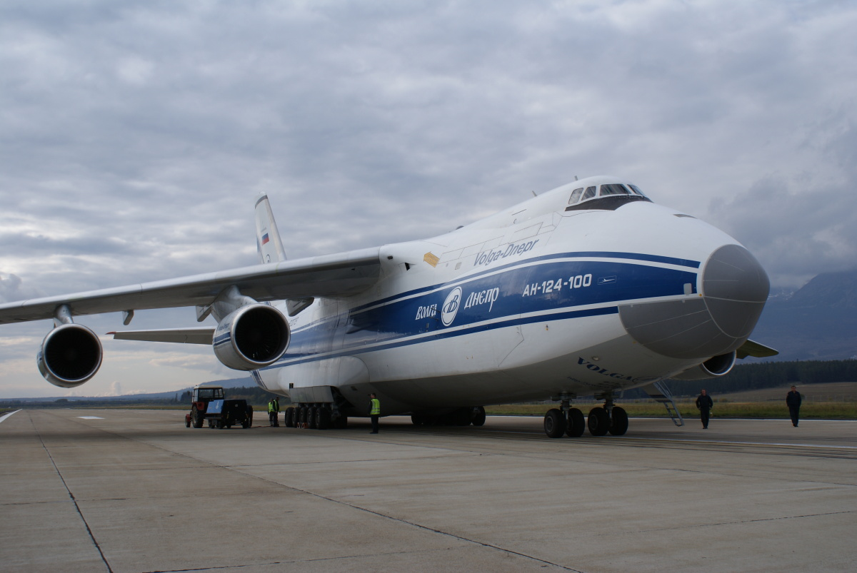 An 124 Ruslan -100 airport Poprad Tatry Slovakia